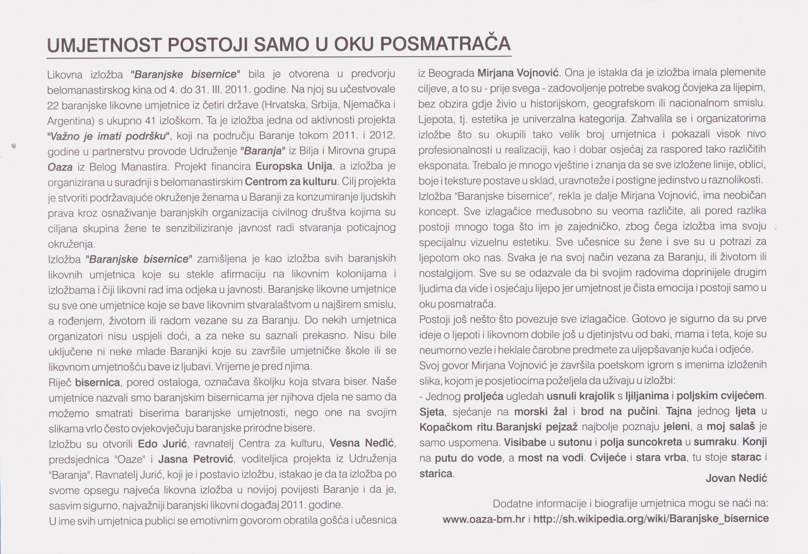 Baranjske bisernice (katalog izložbe), Mirovna grupa Oaza Beli Manastir, 2011, ISBN 978-953-95299-6-1